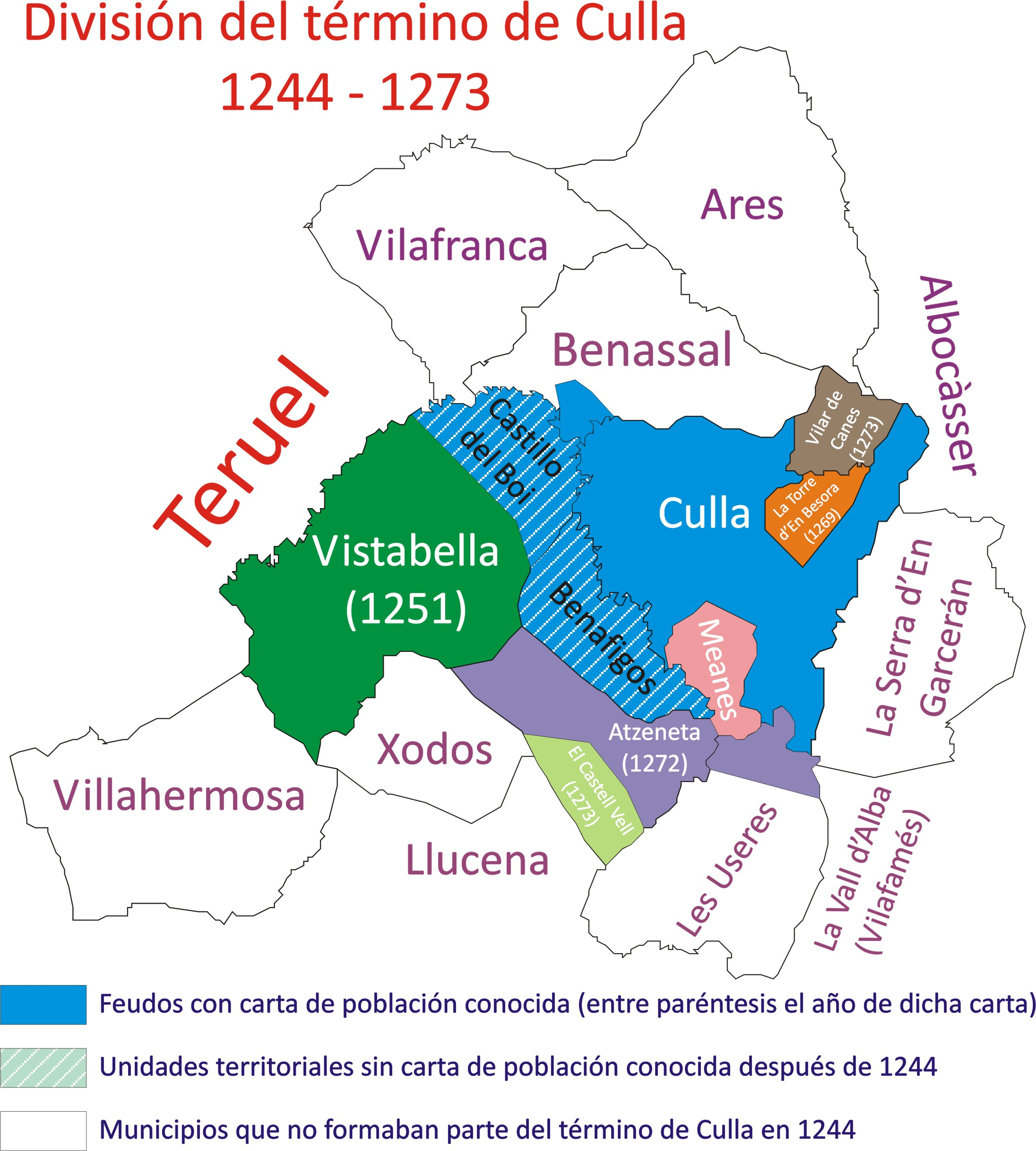 Evolución del término municipal de Culla desde 1244 a 1273